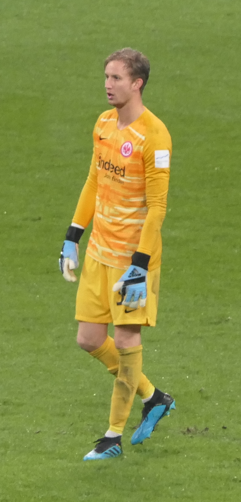 Der Fussballprofi Frederik Rønnow im Trikot von Eintracht Frankfurt beim Heimspiel gegen den SV Werder Bremen am 06.10.2019.